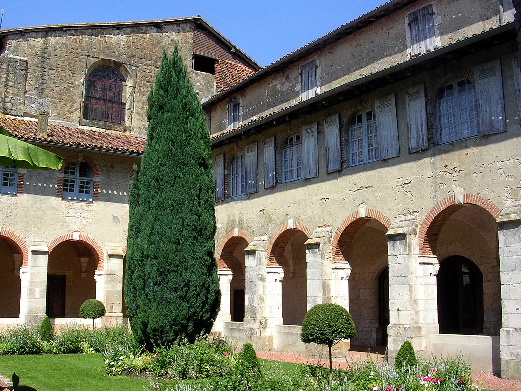 Abbaye bénédictine de Saint-Sever, dans les Landes (France) : le cloître